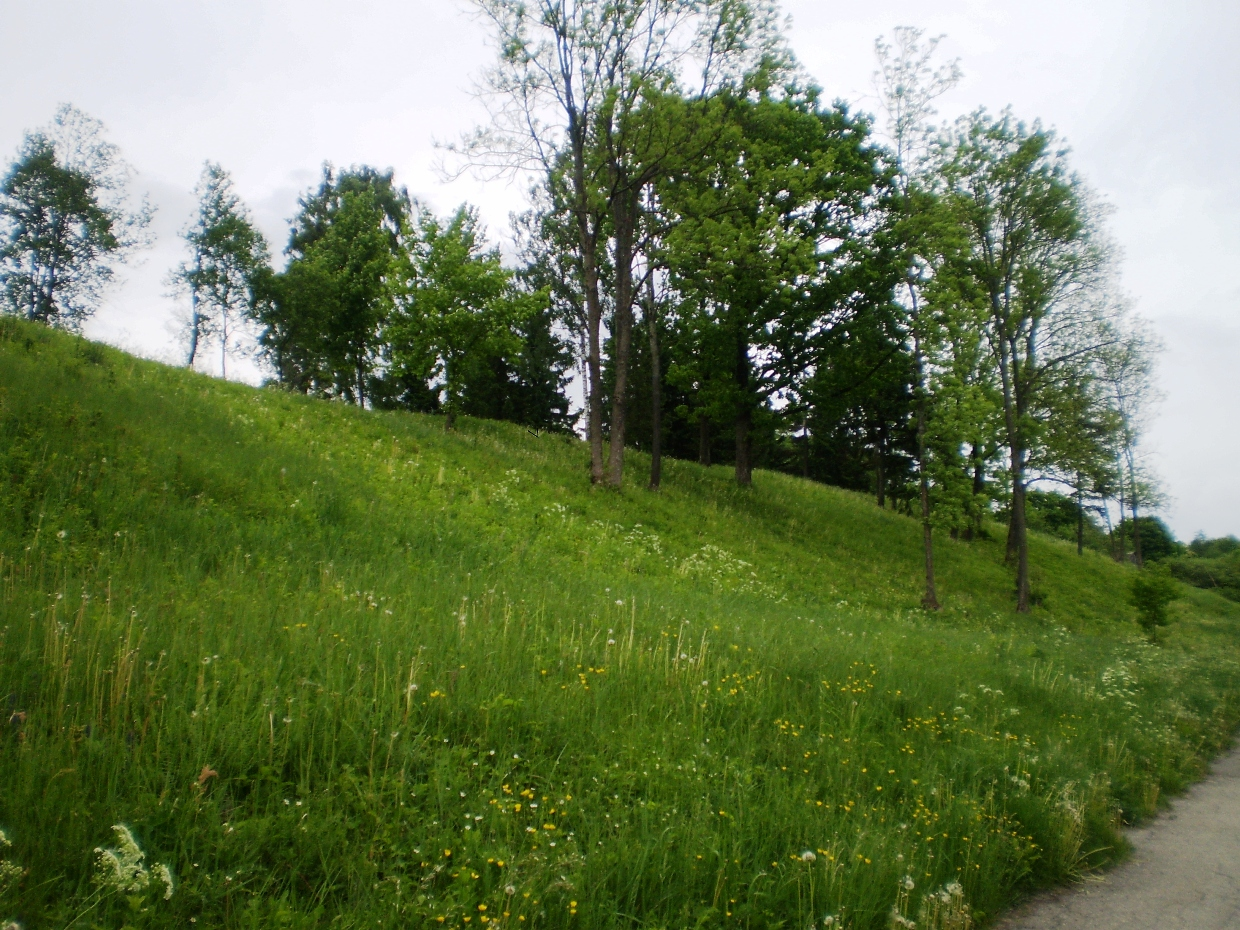 Plinkaigalio piliakalnis, Kėdainių raj.